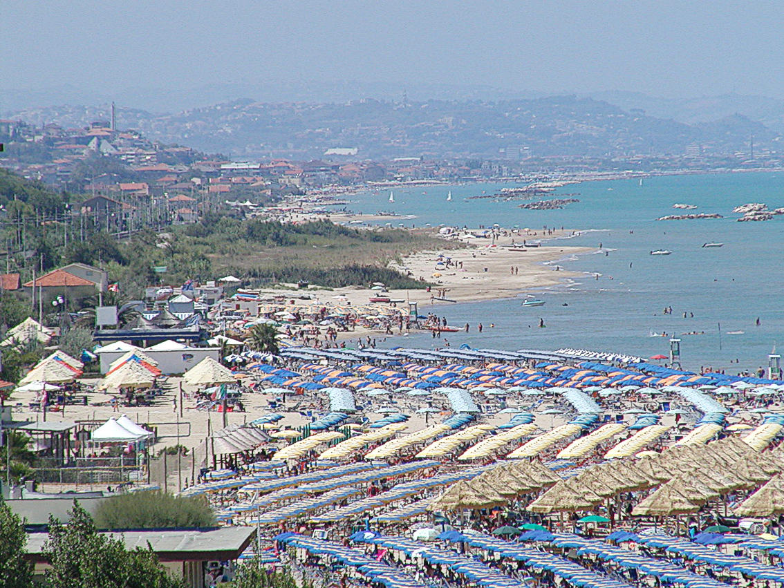 Ortona